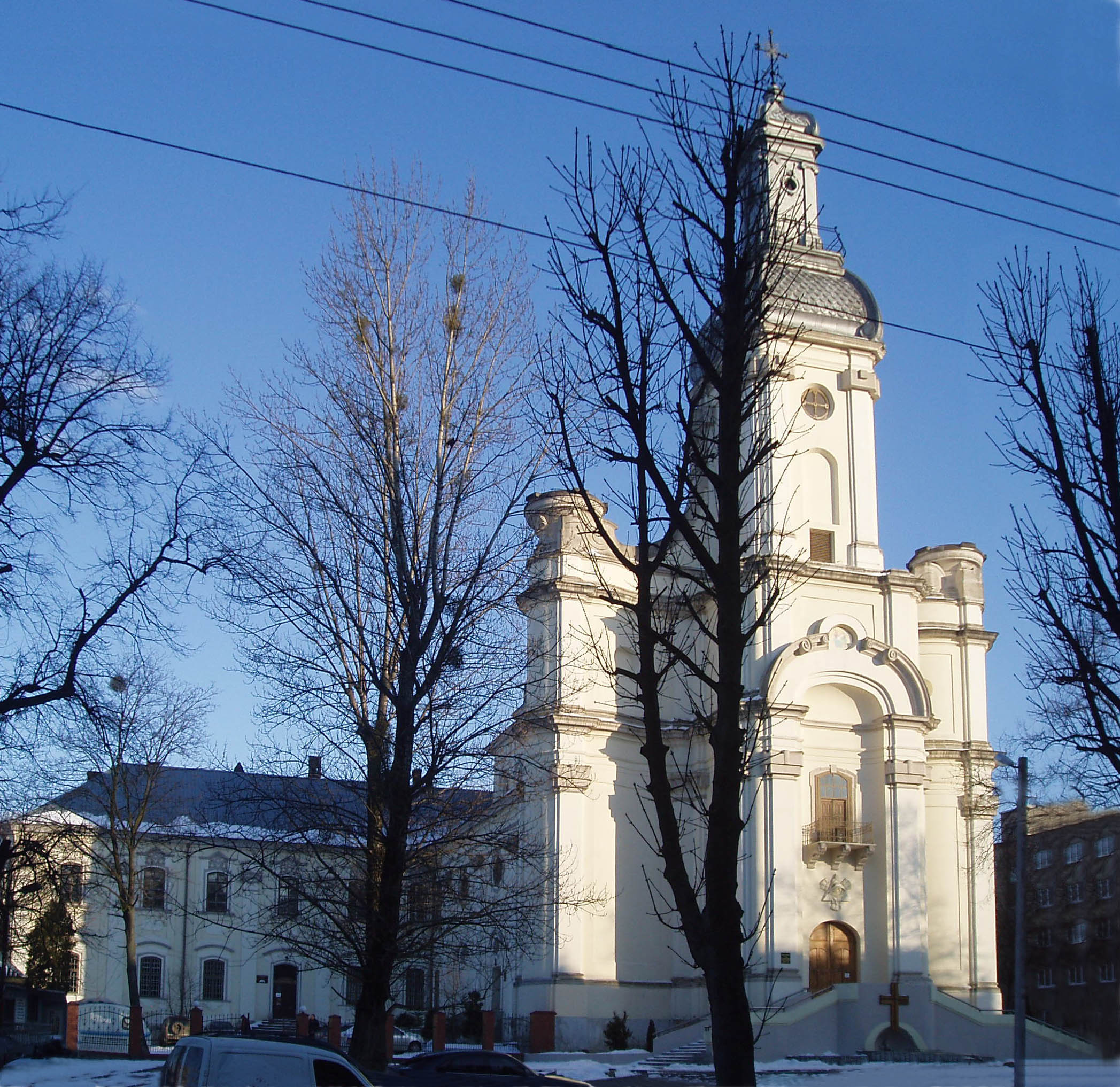 Церква Пресвятої Трійці, колишній монастир сакраменток у Львові.